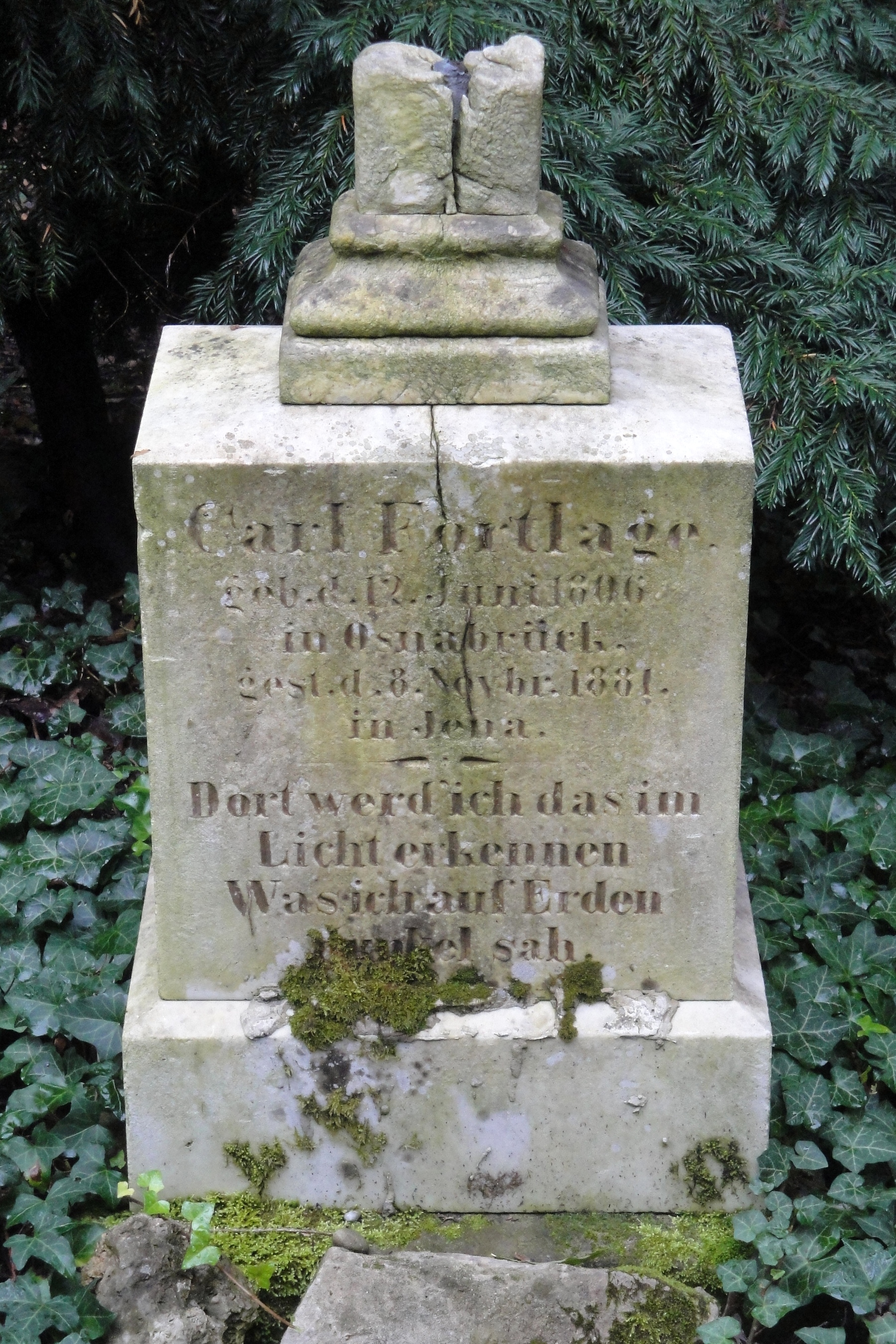 Grab von Carl Fortlage auf dem Johannisfriedhof in Jena